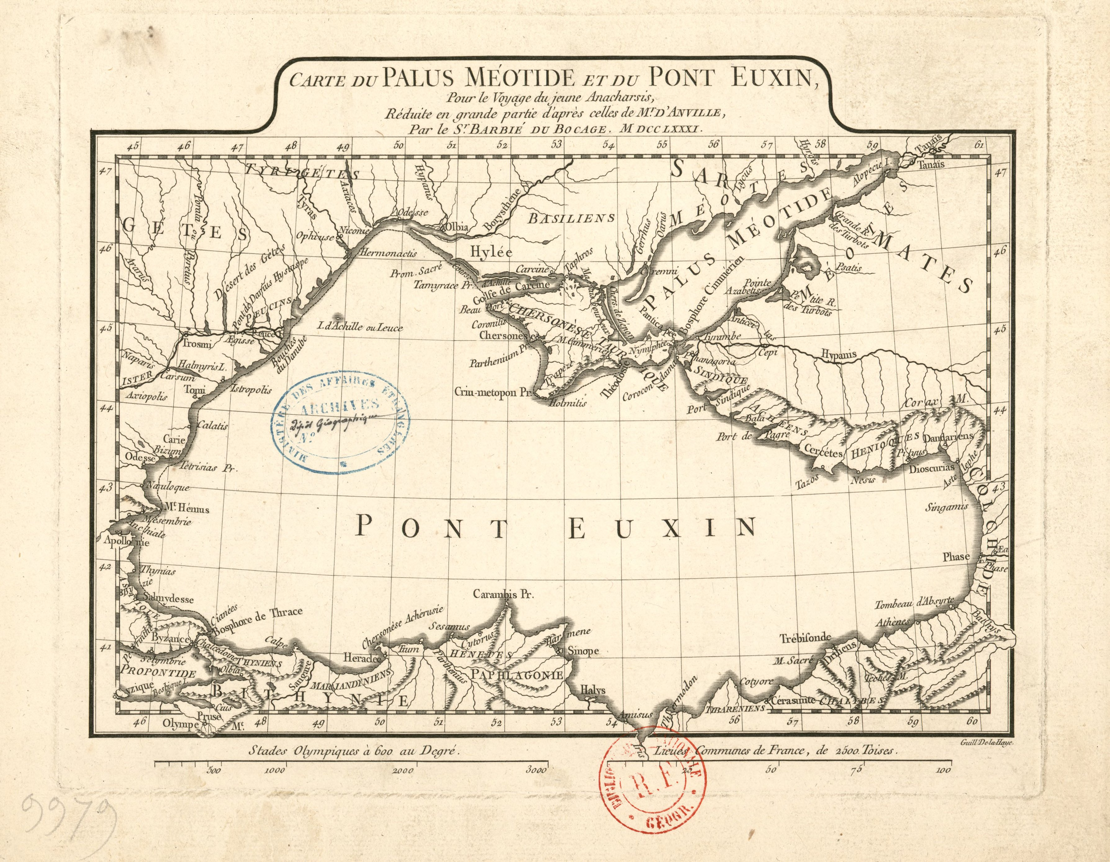 Carte du Palus Méotide et du Pont Euxin, pour le voyage du jeune Anacharsis, réduite en grande partie d'après celles de Mr. d'Anville / par le Sr. Barbié du Bocage ; Guill. De-la-Haye.